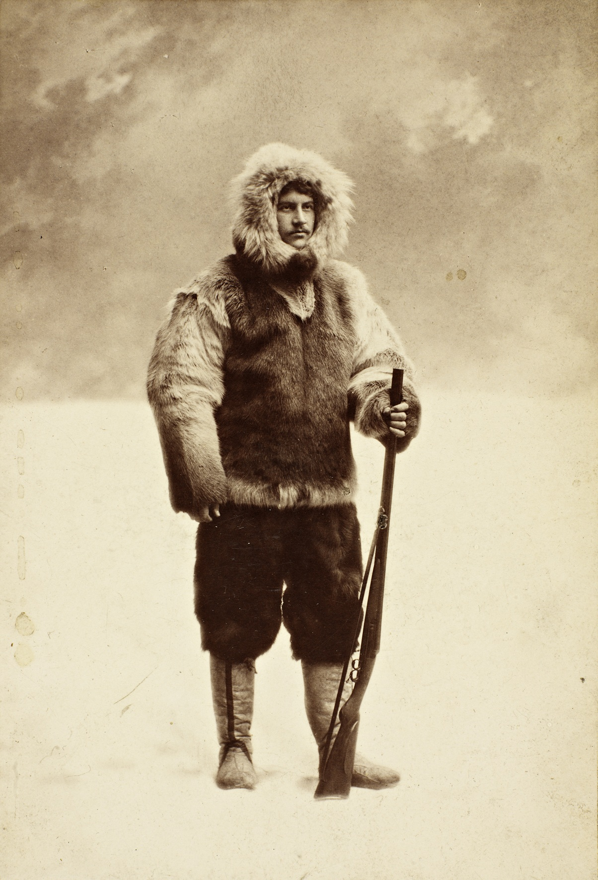 Tittel / Title: Portrett av Eivind Astrup (1871-1895) Motiv / Motif: Kabinettkort. Astrup var polarforsker og deltok i flere av Robert Pearys ekspedisjoner. Dato / Date: ca 1893 Fotograf / Photographer: Nyblin (Kristiania) Sted / Place: Oslo Eier / Owner Institution: Nasjonalbiblioteket / National Library of Norway Lenke / Link: Bildesignatur / Image Number: blds_01178